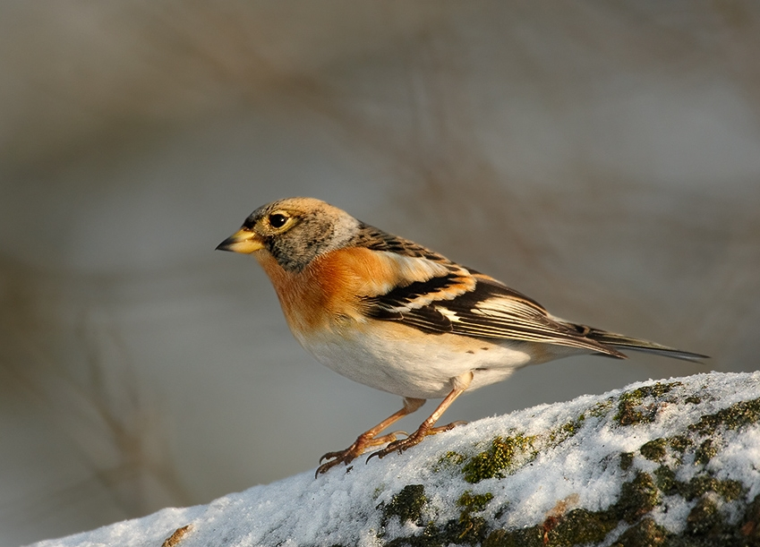 Fringilla montifringilla - male in winter